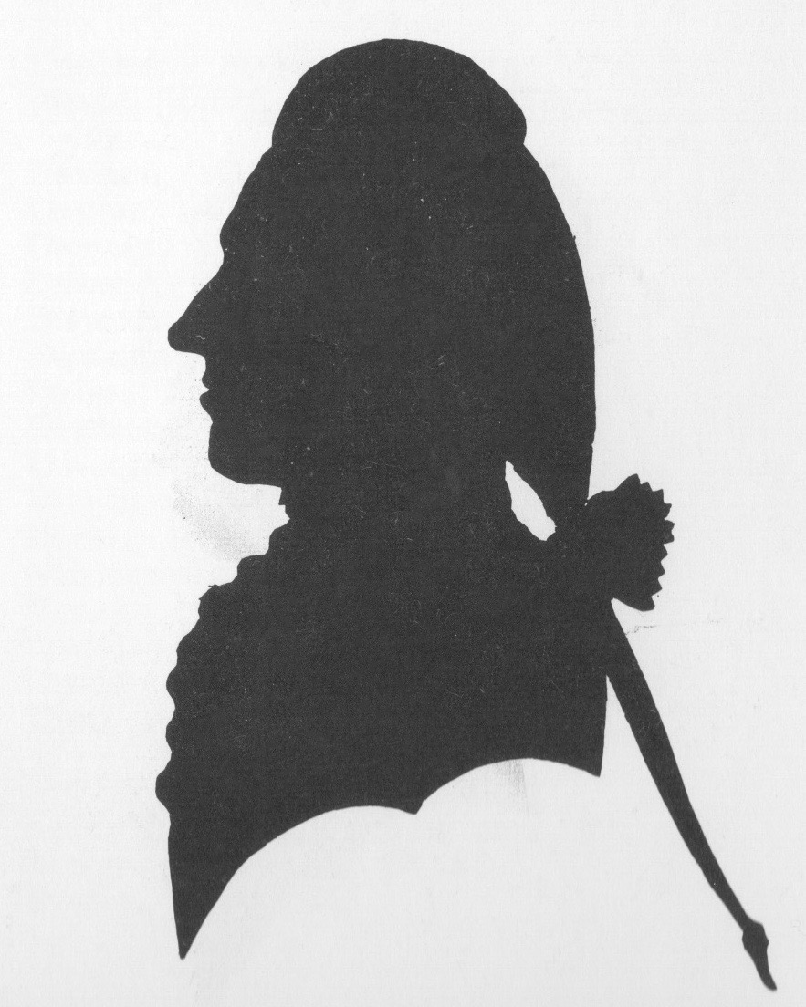 Bernhard Albrecht Moll (1743–1788): Der Mineraloge Karl Haidinger (1756–1797). Royal Ontario Museum, Toronto.